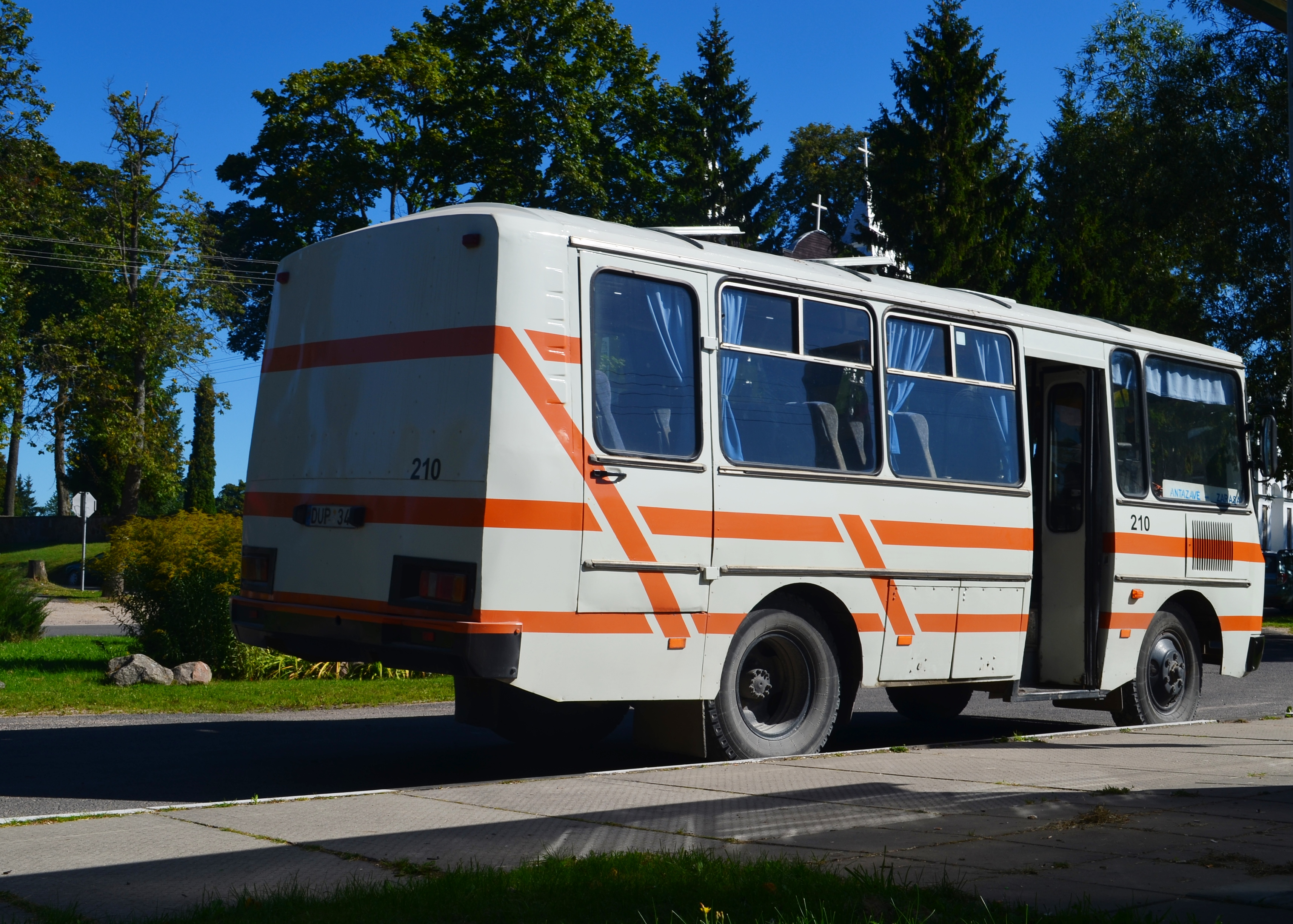 PAZ 3205 iš galo, Antazavė, Zarasų raj.